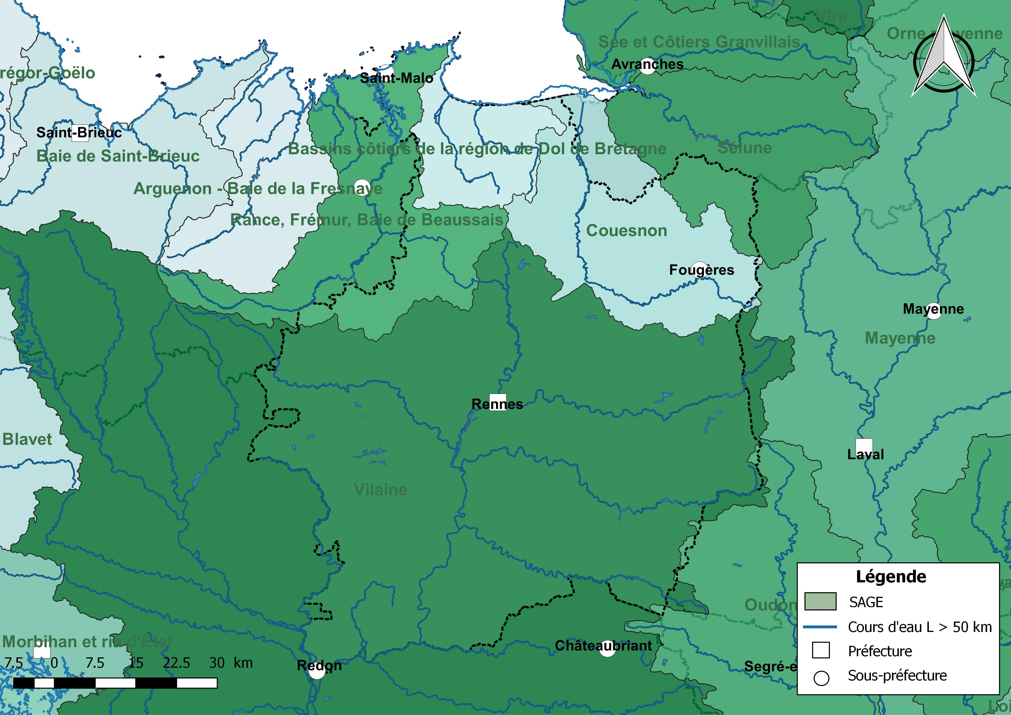 Carte des schémas d'aménagement et de gestion des eaux (SAGE) concernant le département d'Ille-et-Vilaine (France) au 1er janvier 2018.